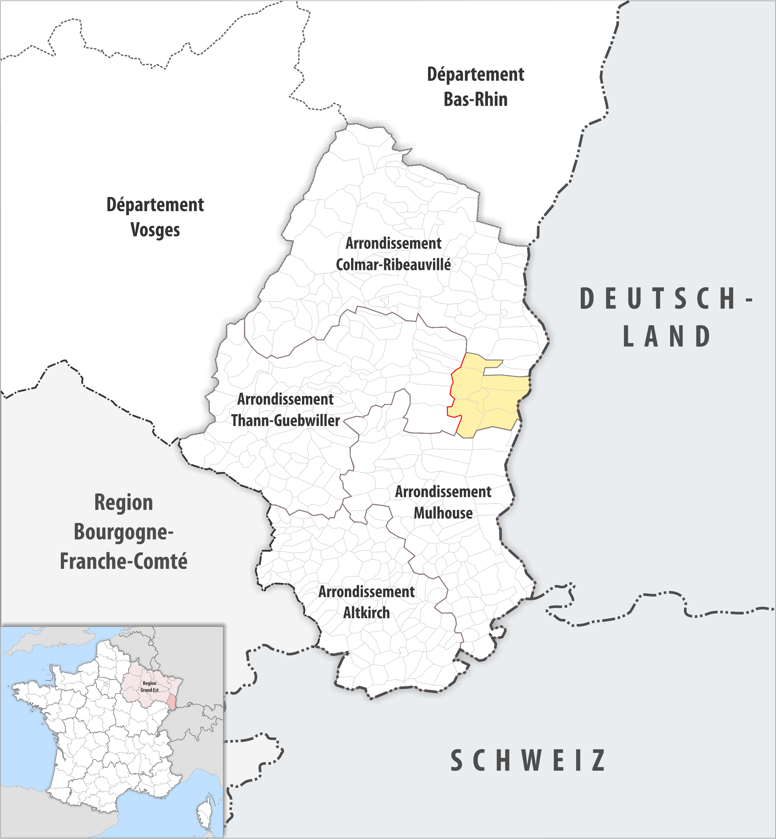 Arrondissements Anpassungen auf 2017 im Departement Haut-Rhin